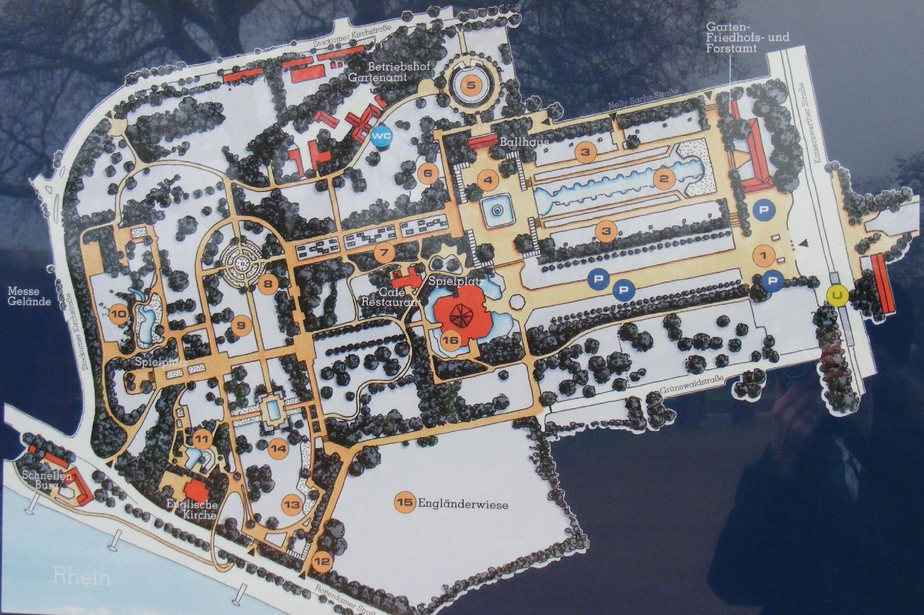 Plan du Dusseldorf Exhibition Center, construit en 1937